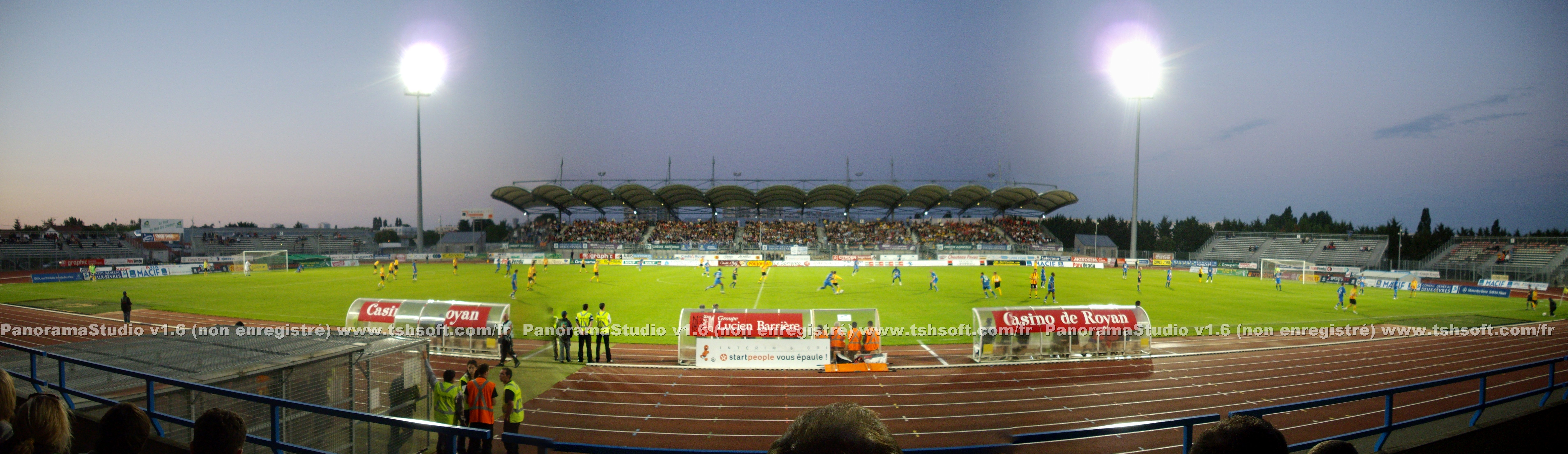 Panorama du Stade René-Gaillard de Niort.